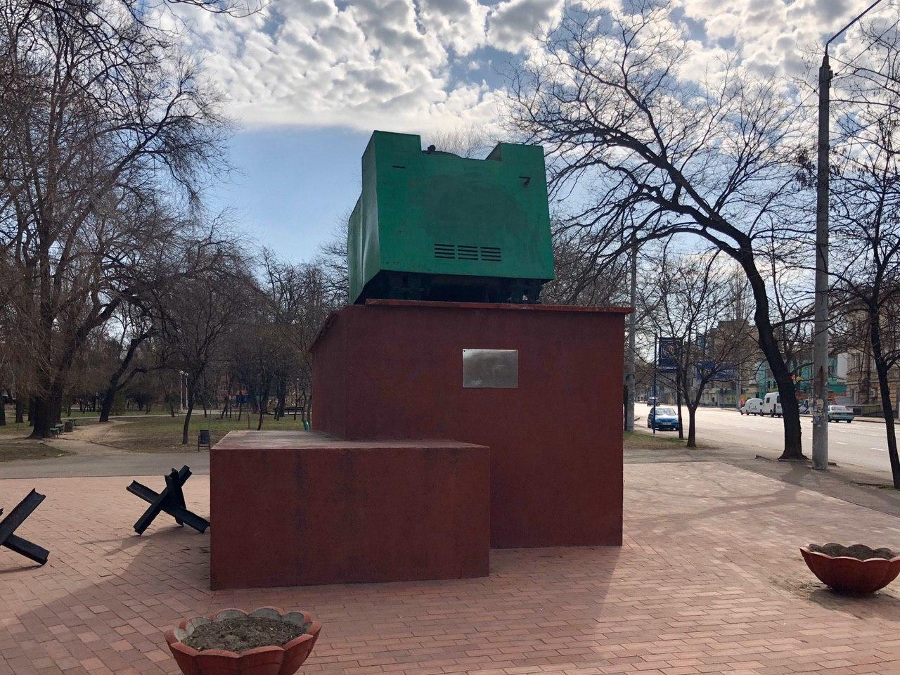 НИ-1 («На испуг») Одесса